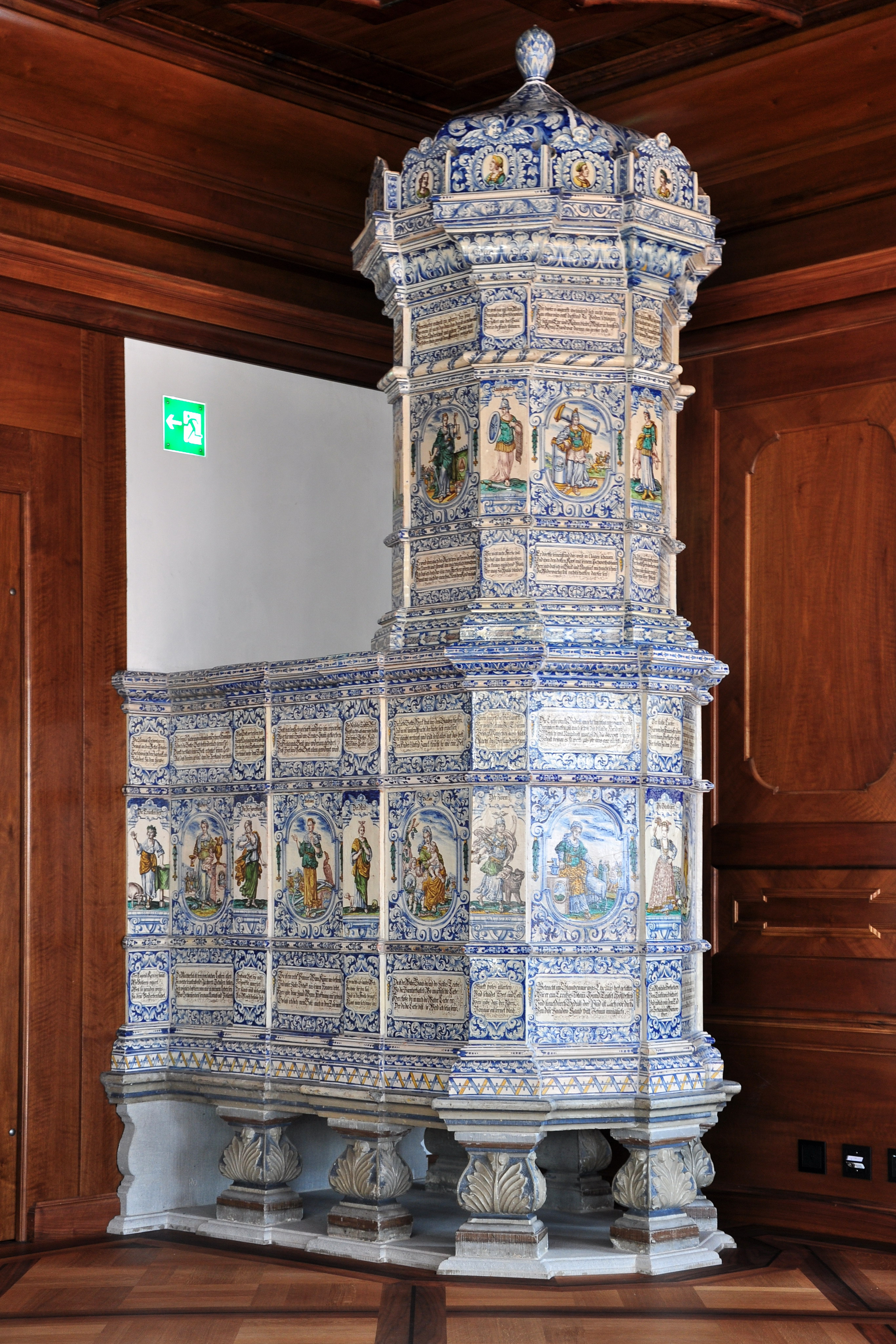 Zunfthaus zur Zimmerleuten – rebuilt and newly inaugurated in October 2010 – at Limmatquai in Zürich (Switzerland)